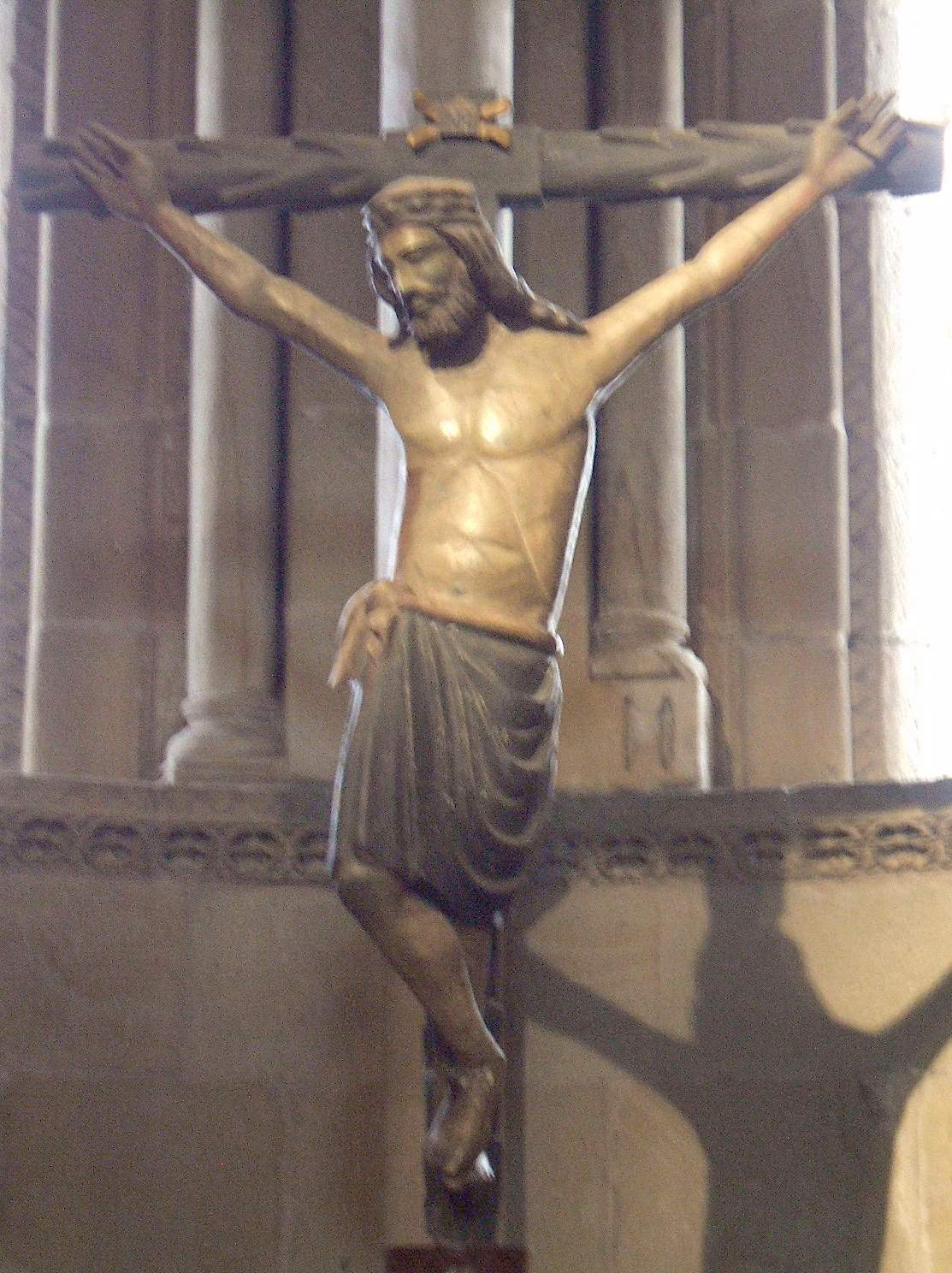 Iglesia de San Juan de Rabanera (Soria)